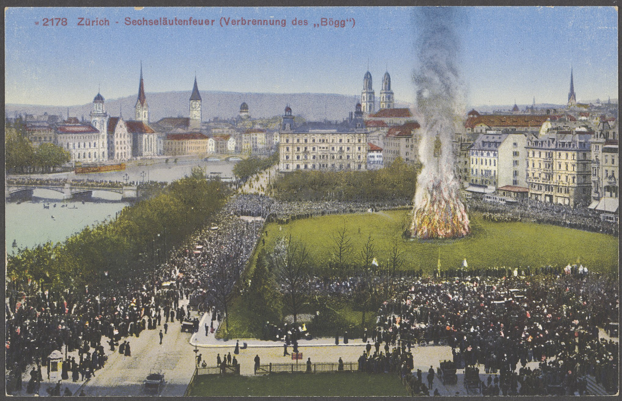 Photoglob Nummer 2178